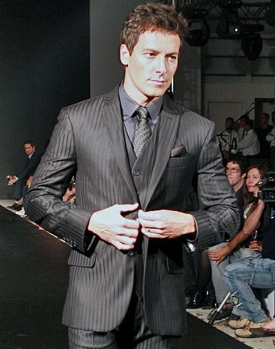 Rodrigo Faro, ator brasileiro